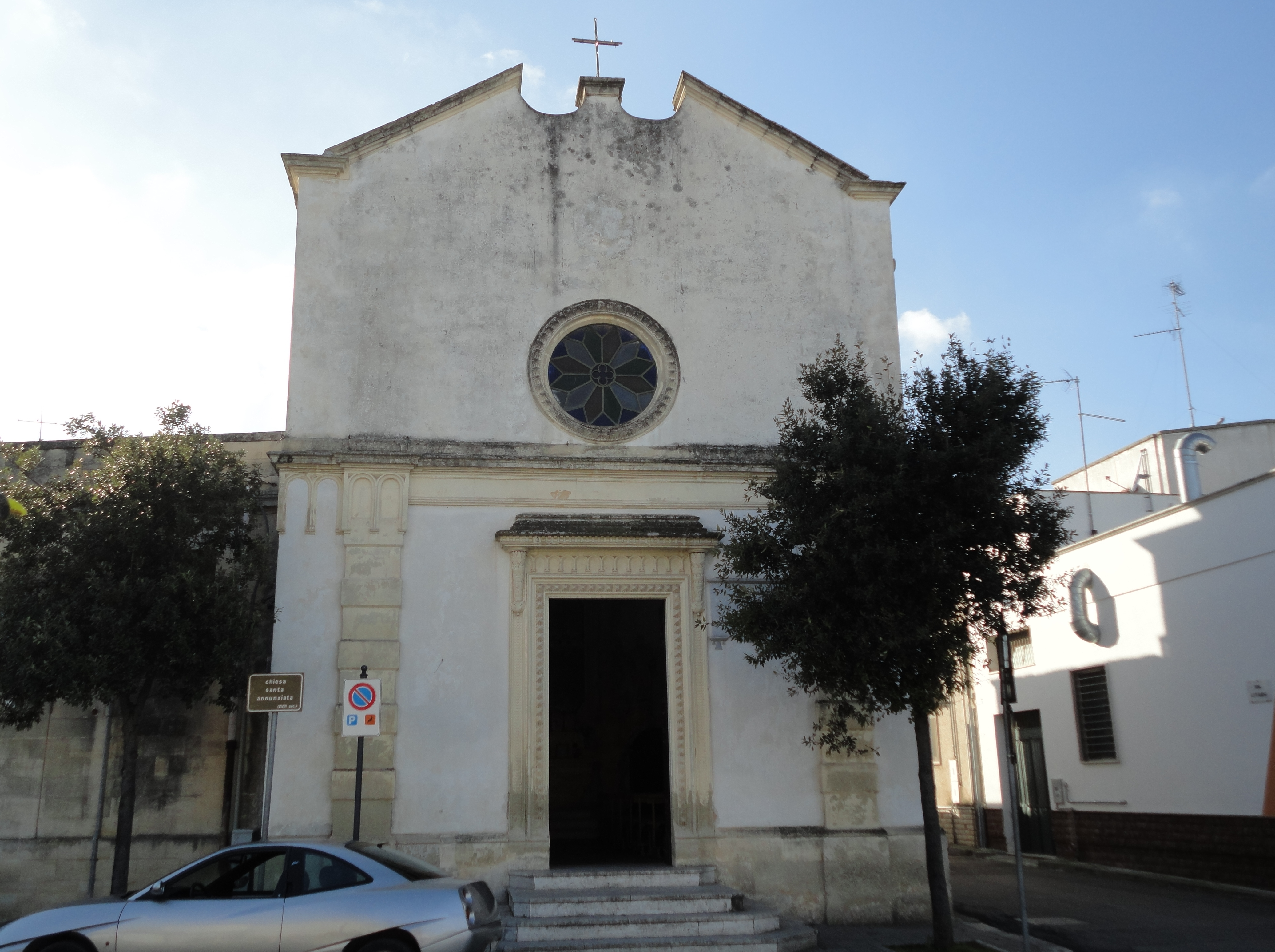 Chiesa dell'Annunziata Sternatia, Lecce